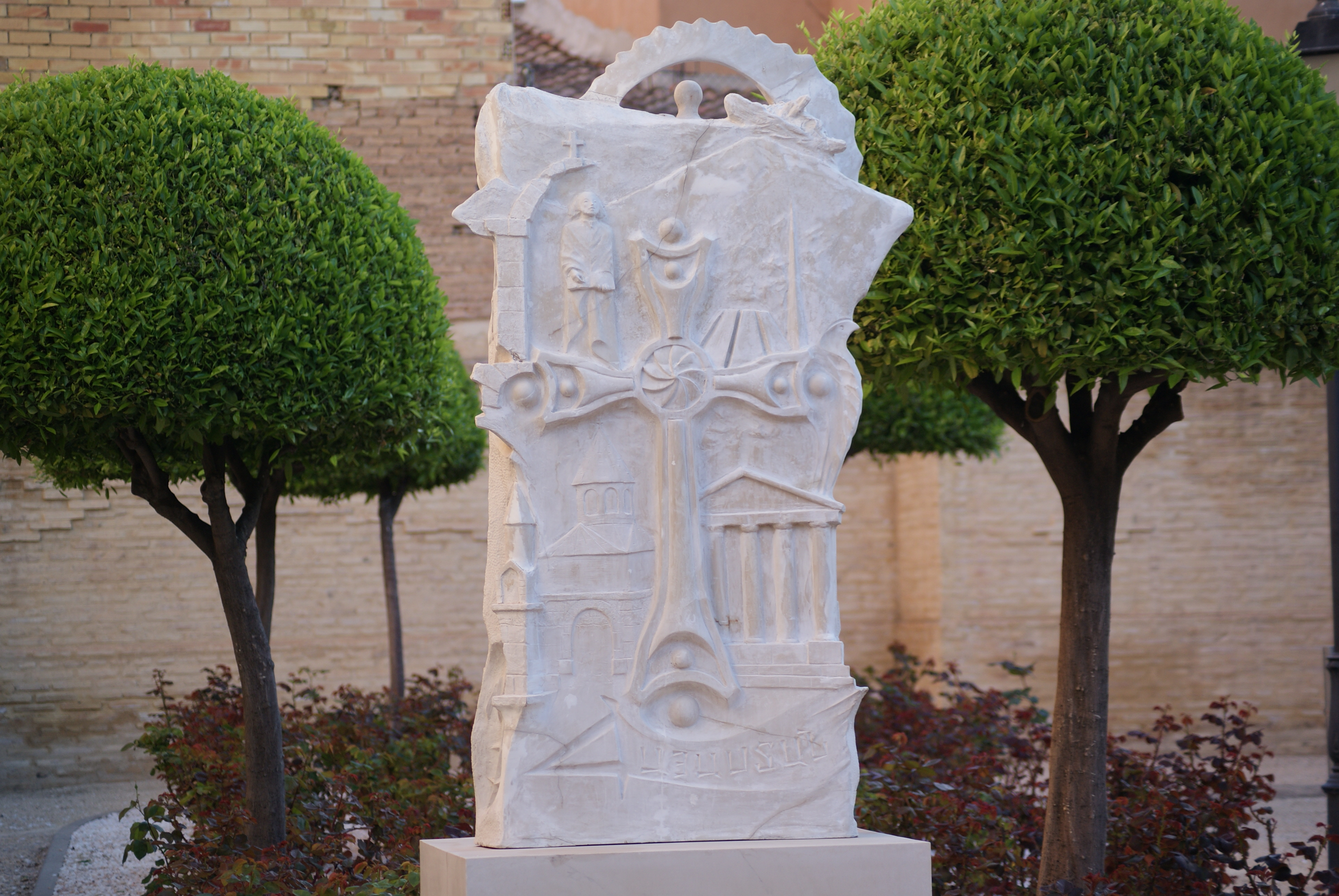 Monumento erigido en Mislata (Valencia) en memoria del Genocidio Armenio.